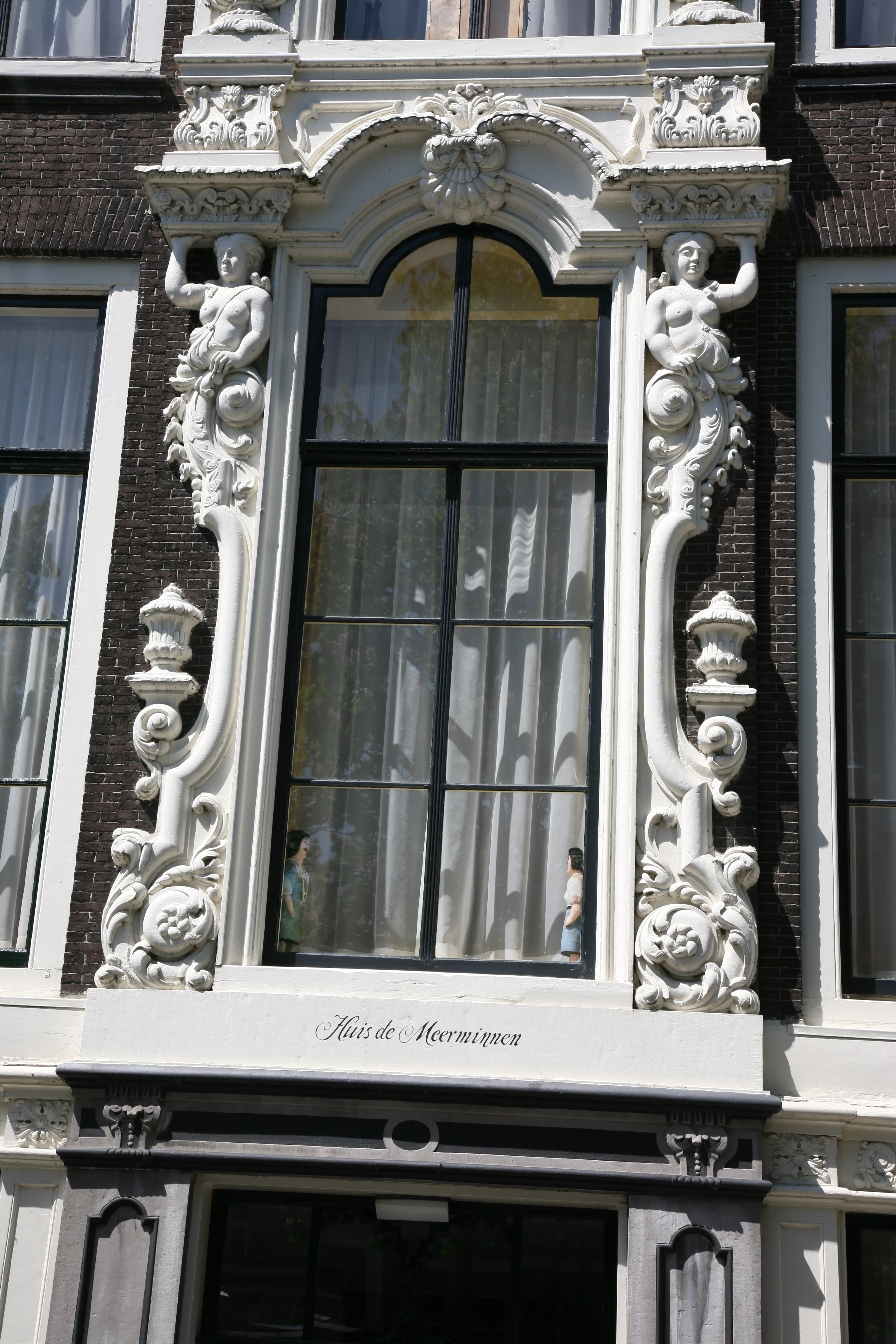 Voorgevel van Huis de Meerminnen Dordrecht